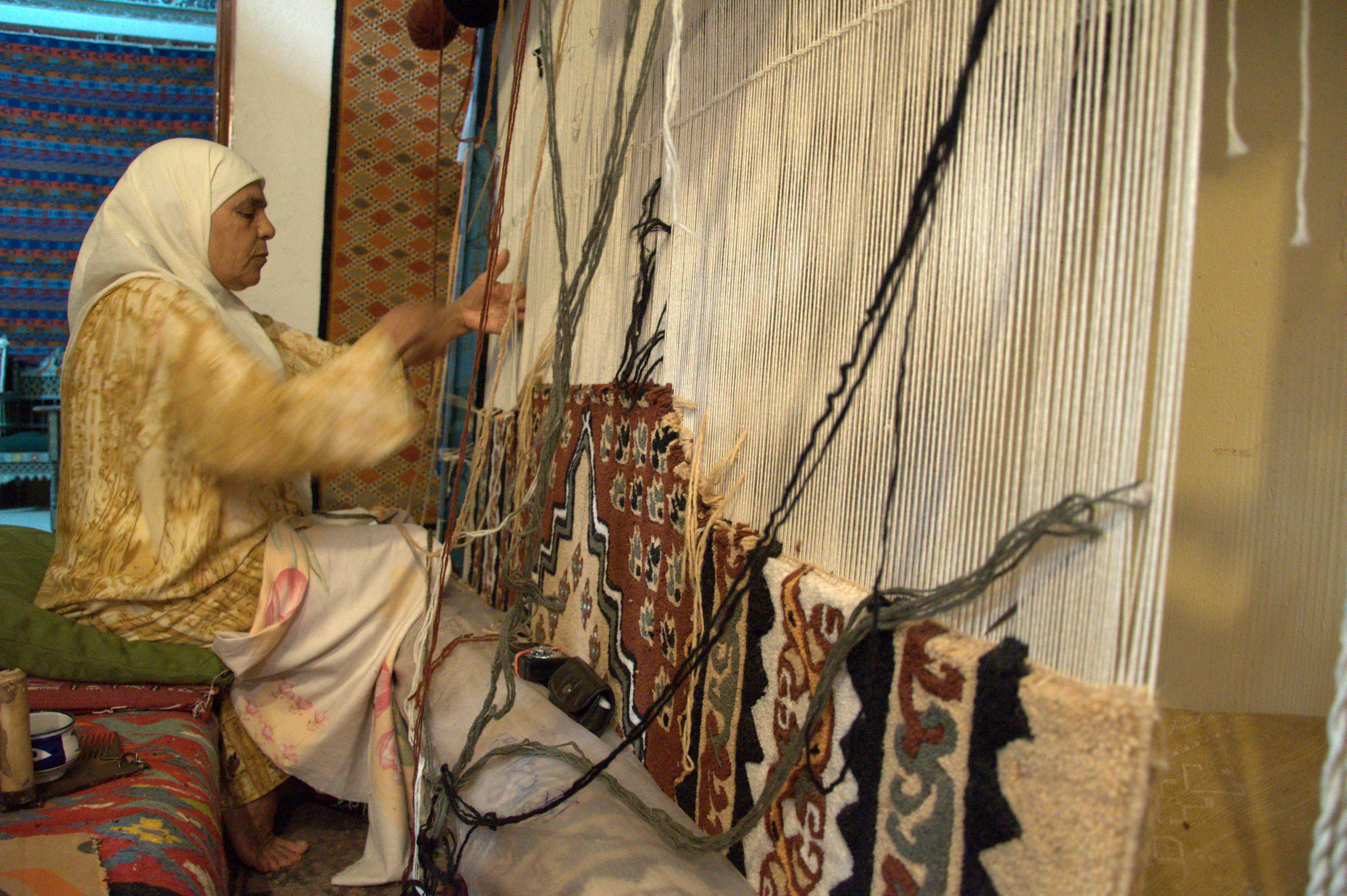 Tisserande de tapis traditionnel à Kairouan (Tunisie)